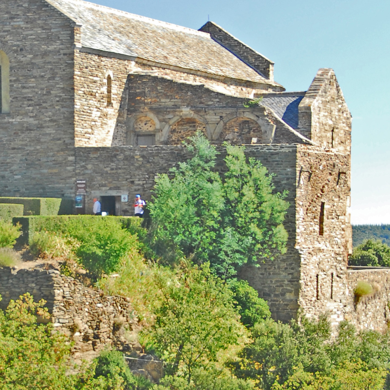 Serraboner, Konventstrakt von SW